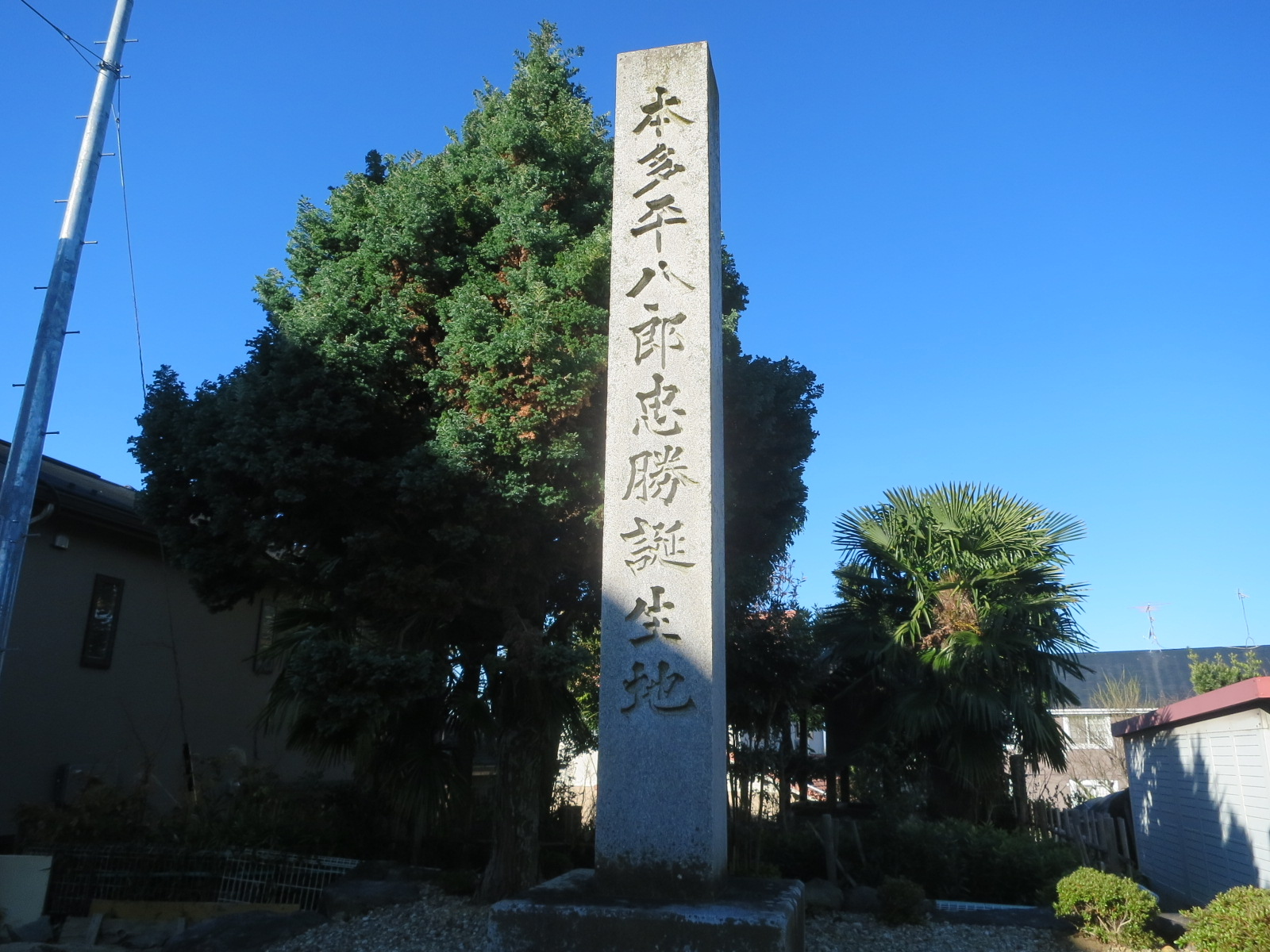 本多平八郎忠勝誕生地石碑